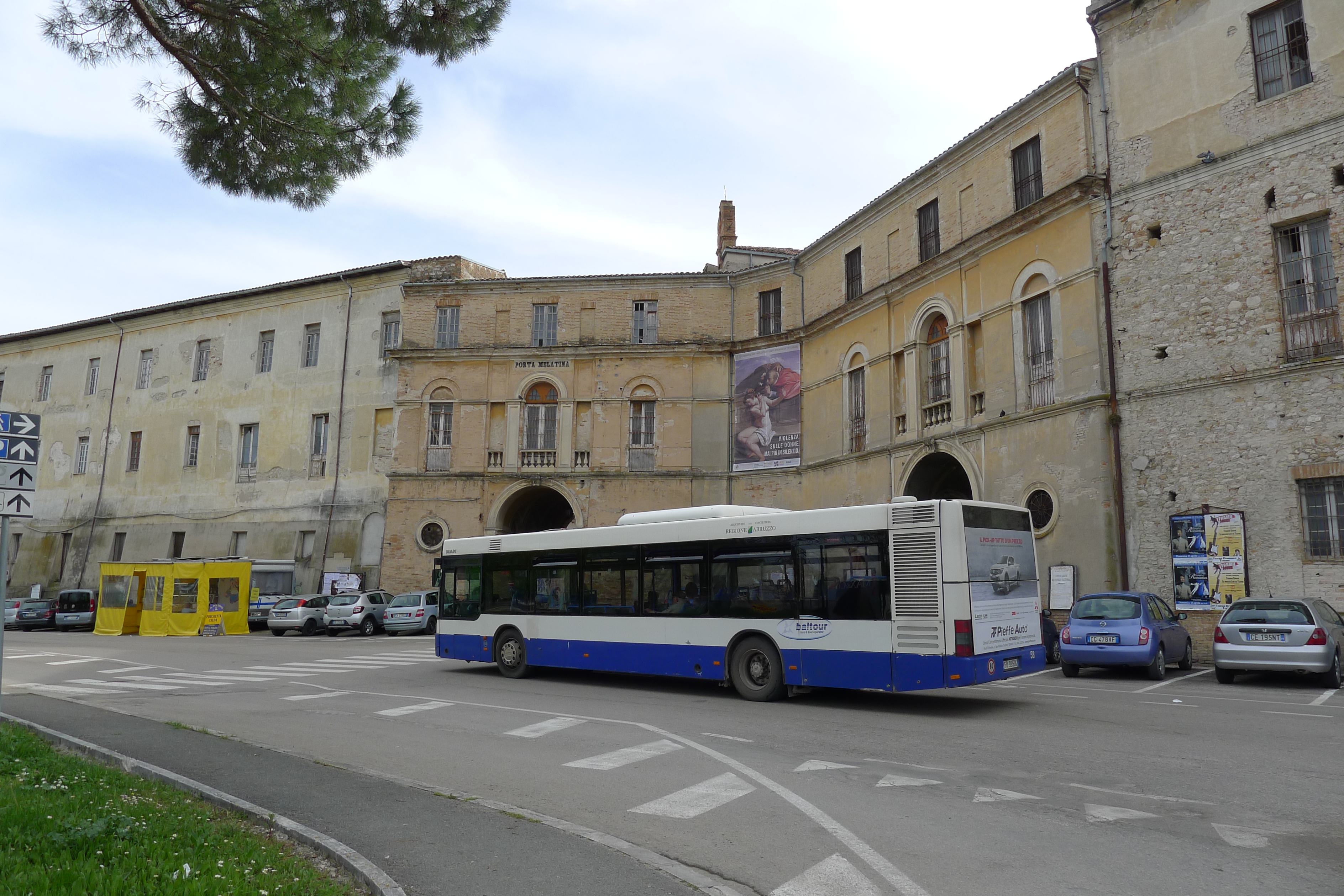 Bus Teramo Porta Melatina